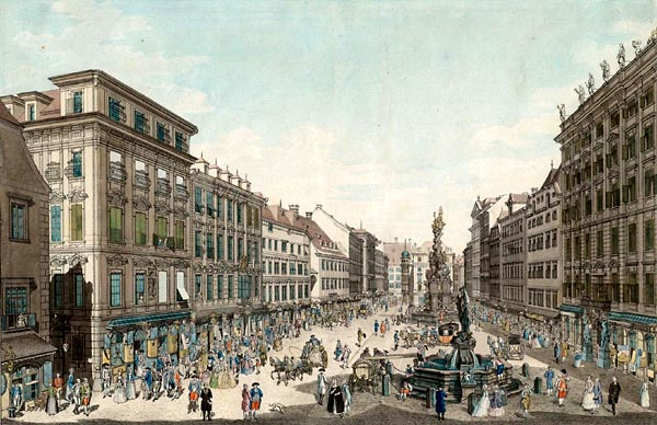 Carl Schütz (1745–1800): Am Graben, Wien, 1781.